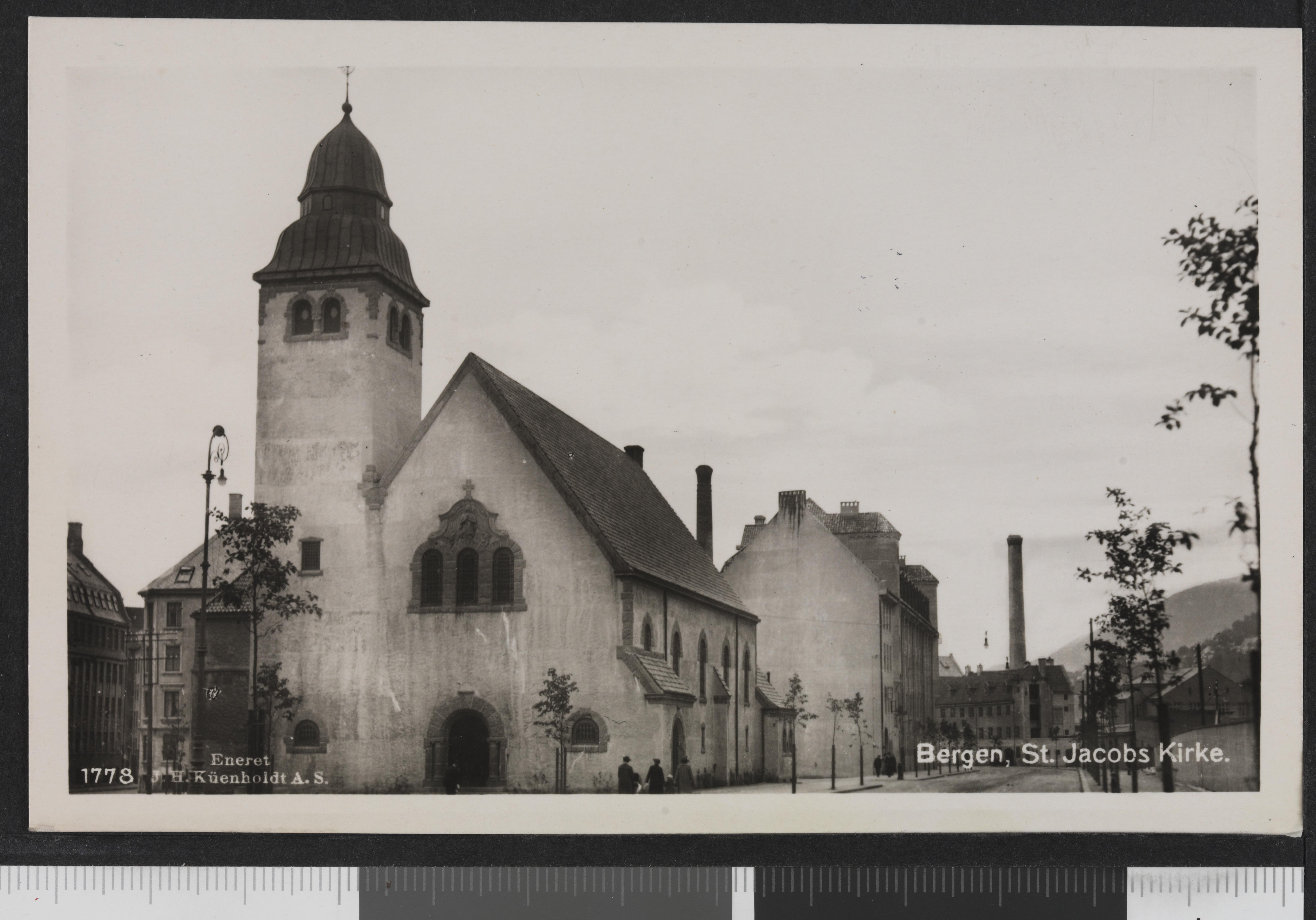 Bildet er hentet fra Nasjonalbibliotekets bildesamling Bergen, Hordaland